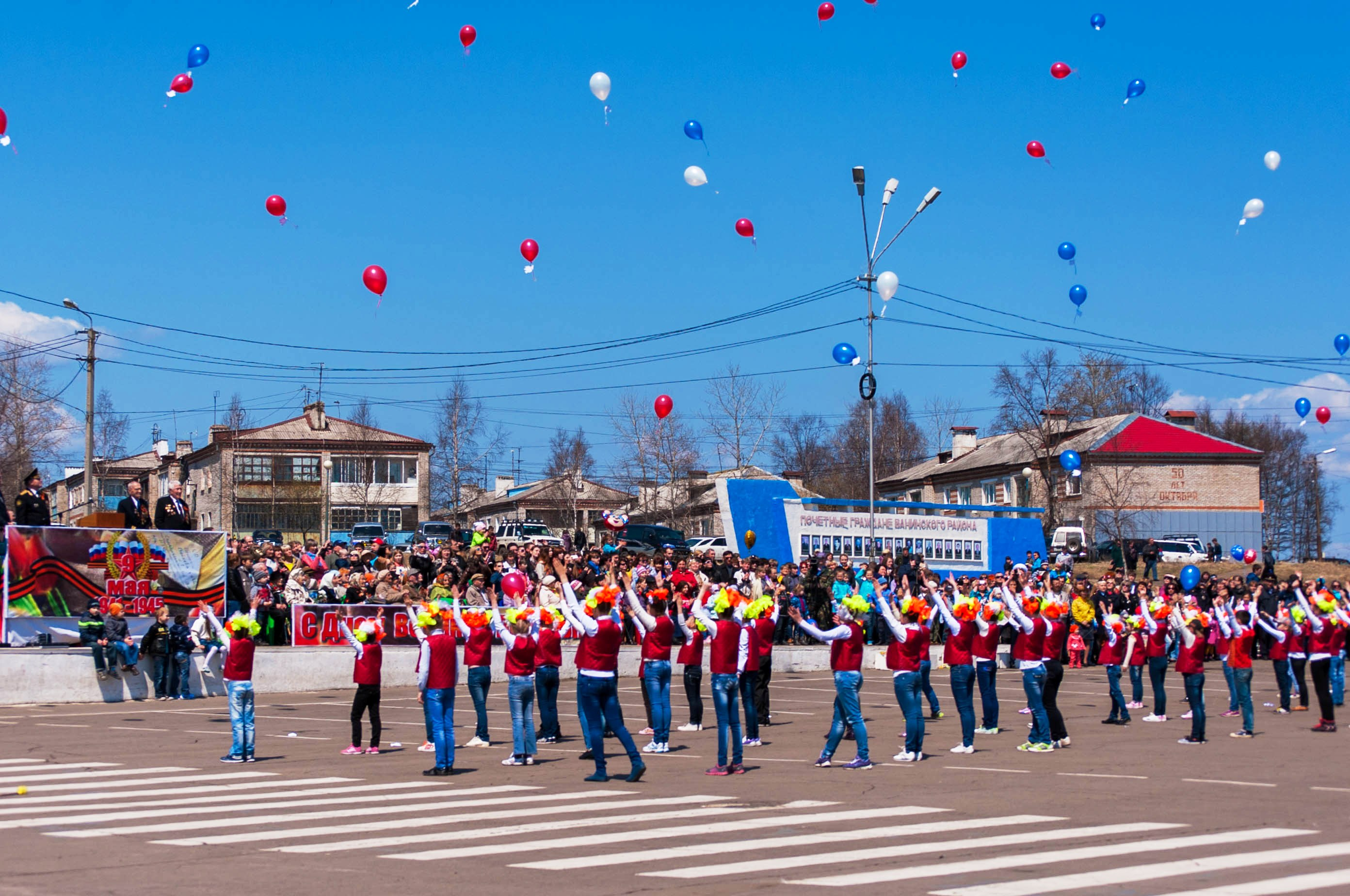 Ванино - парад на пл. Мира 9 мая 2014 года